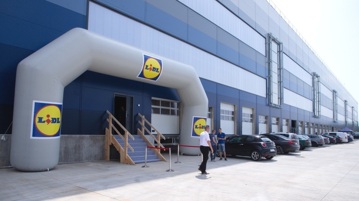 Stargard. Centrum dystrybucyjne Lidla